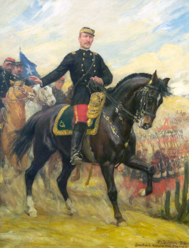 El general Manuel Baquedano revistando sus tropas. Óleo sobre tela del pintor Pedro Subercaseaux Errázuriz (1912). Pinacoteca del Museo de la Escuela Militar. Manuel Jesús Baquedano González (Santiago; 1 de enero de 1823 - † 30 de septiembre de 1897), fue un militar y presidente chileno, comandante en jefe del Ejército durante la Guerra del Pacífico.